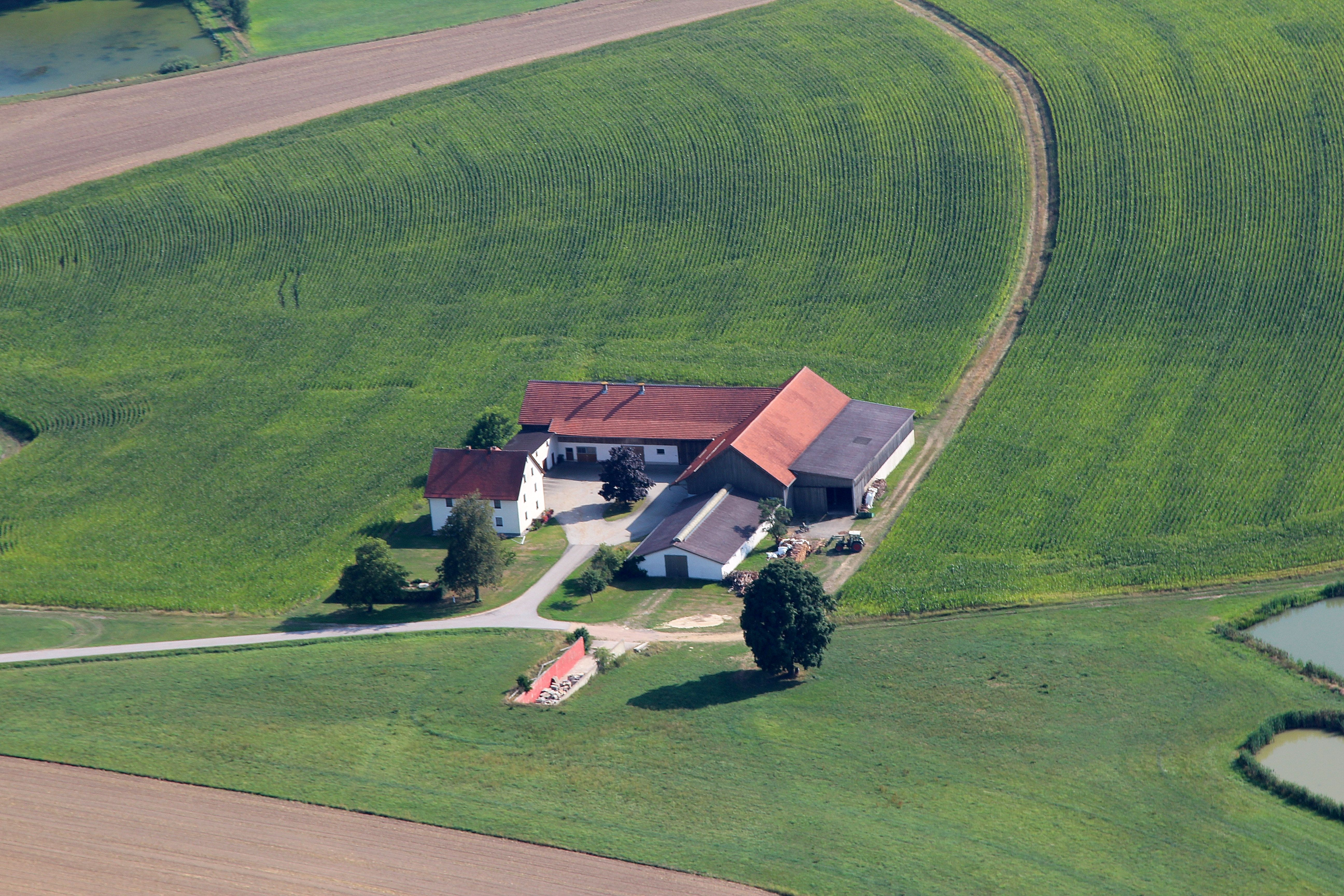 Gonnersdorf; Stadt Neunburg vorm Wald, Landkreis Schwandorf, Oberpfalz, Bayern